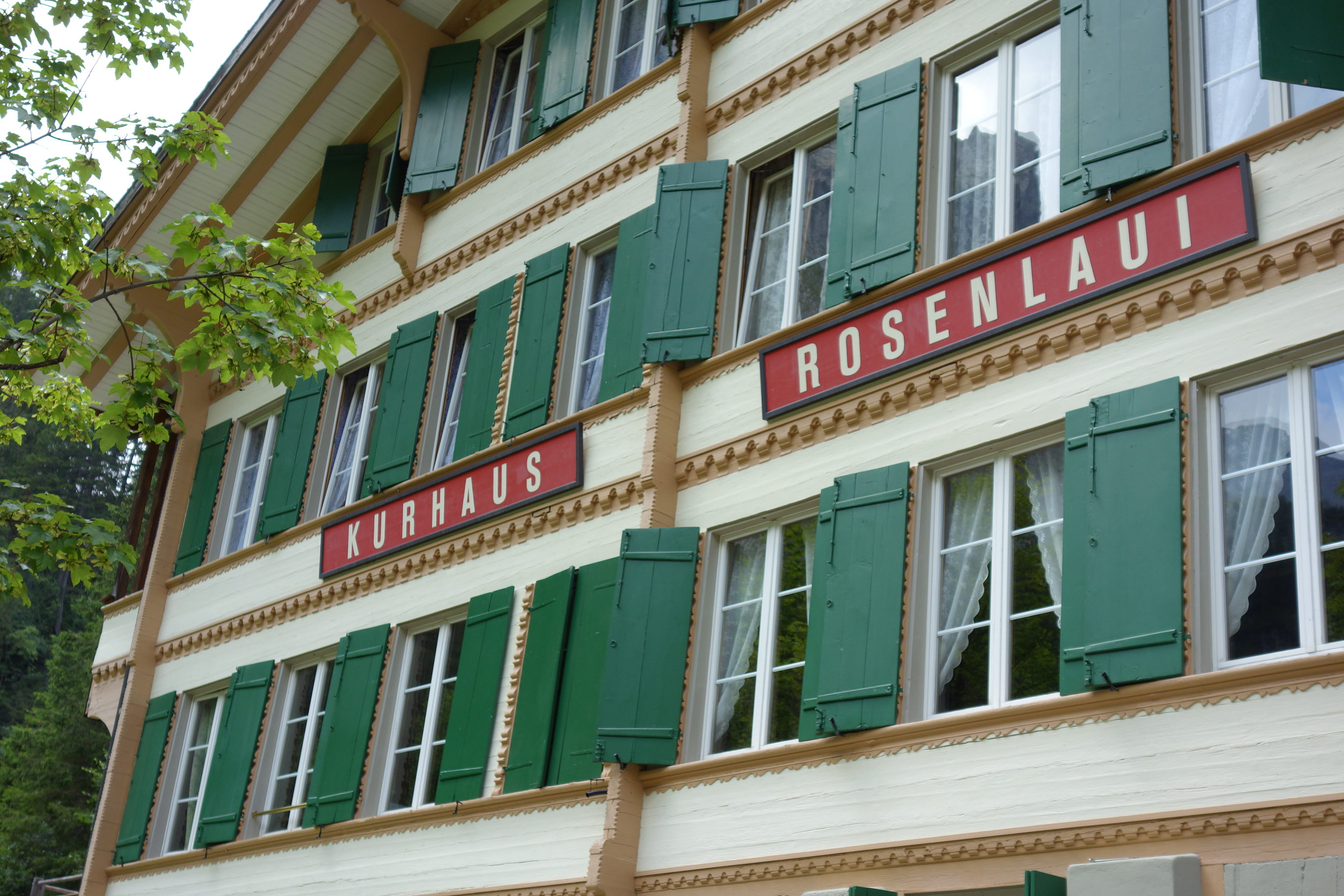 Hotel Rosenlaui, Rosenlaui BE, Schweiz, 2018